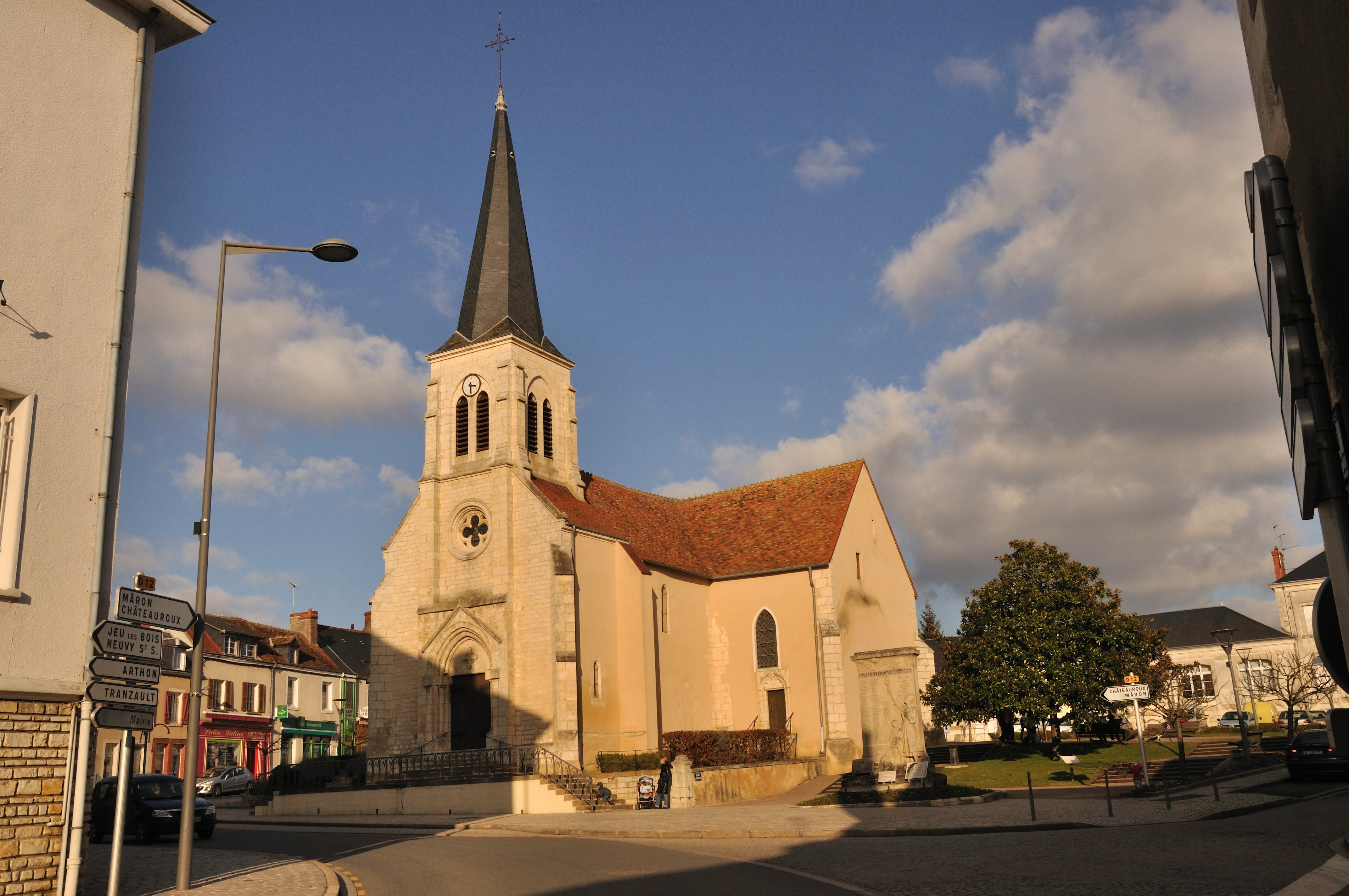 Ardentes (Indre) - Place de la République